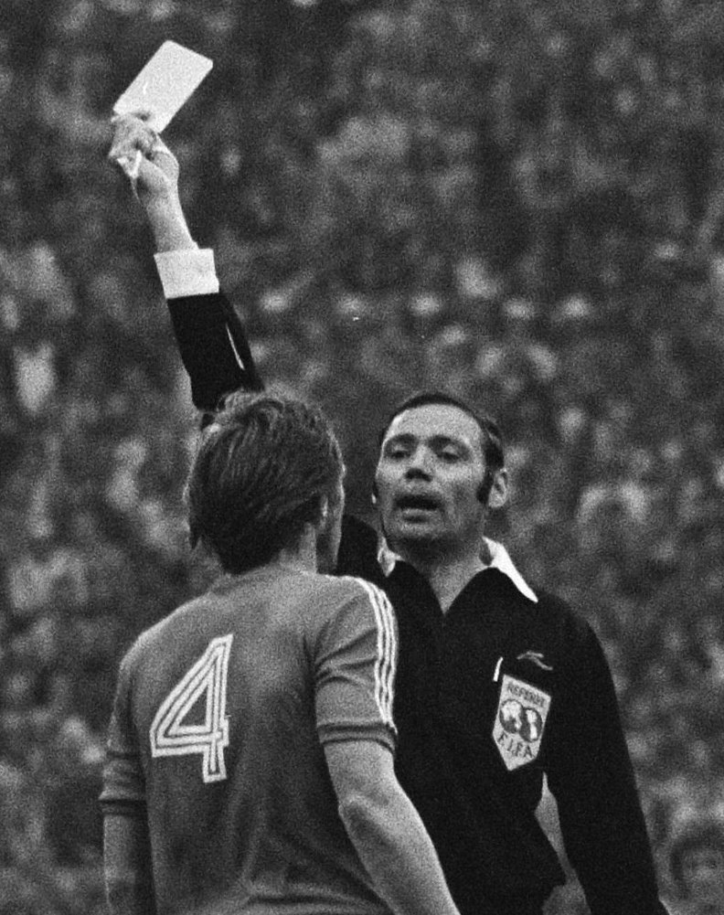 Collectie / Archief : Fotocollectie Anefo Reportage / Serie : [ onbekend ] Beschrijving : WK 74, Nederland tegen Zweden 0-0, nr. 5 gele kaart voor Nordquist (4) Datum : 19 juni 1974 Trefwoorden : WERELDKAMPIOENSCHAPPEN, sport, voetbal Fotograaf : Mieremet, Rob / Anefo Auteursrechthebbende : Nationaal Archief Materiaalsoort : Negatief (zwart/wit) Nummer archiefinventaris : bekijk toegang 2.24.01.05 Bestanddeelnummer : 927-2685